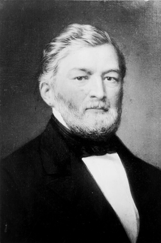 Ferdinand von Quast. Auf einem im Besitz der Familie befindlichen Lichtbild.